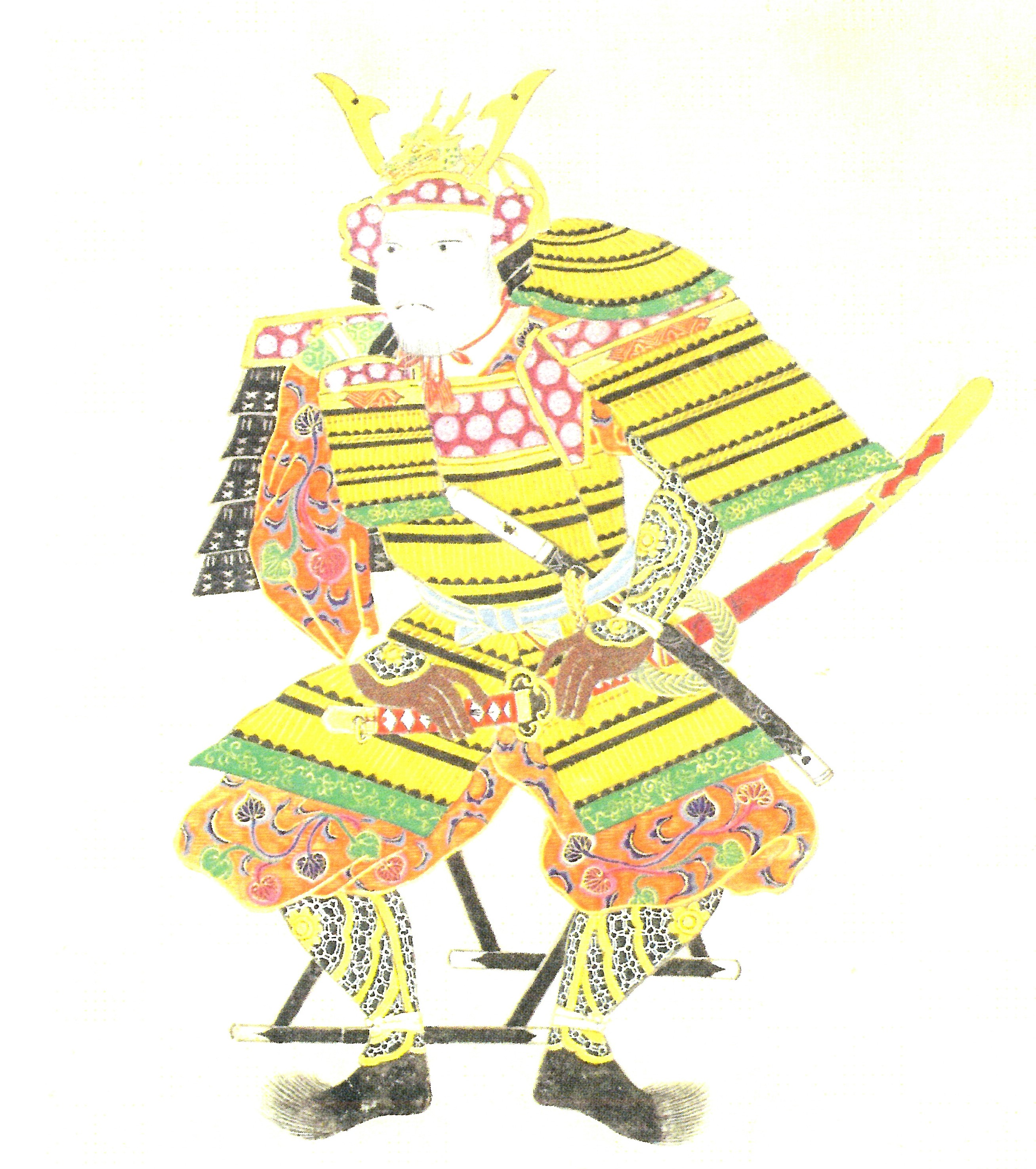 南部晴政の肖像。